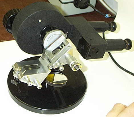 Abbe-Refraktometer aufgeklappt